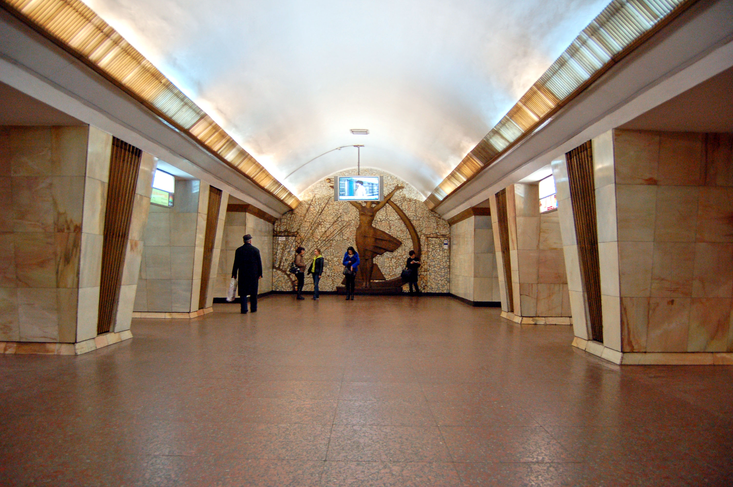 Станция метро «Политехнический институт», центральный зал станции